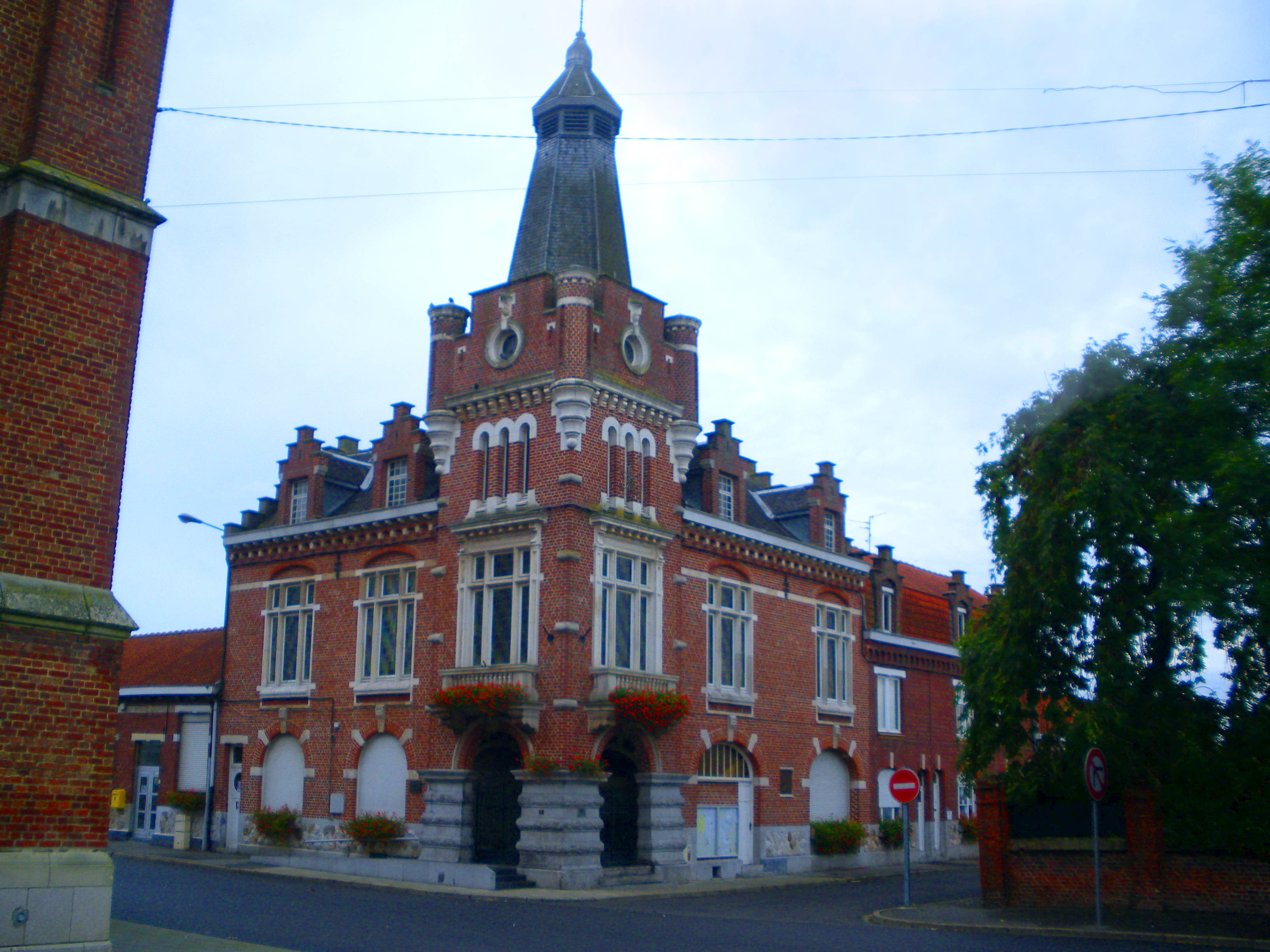 Vue de la mairie de Vieux-Berquin.